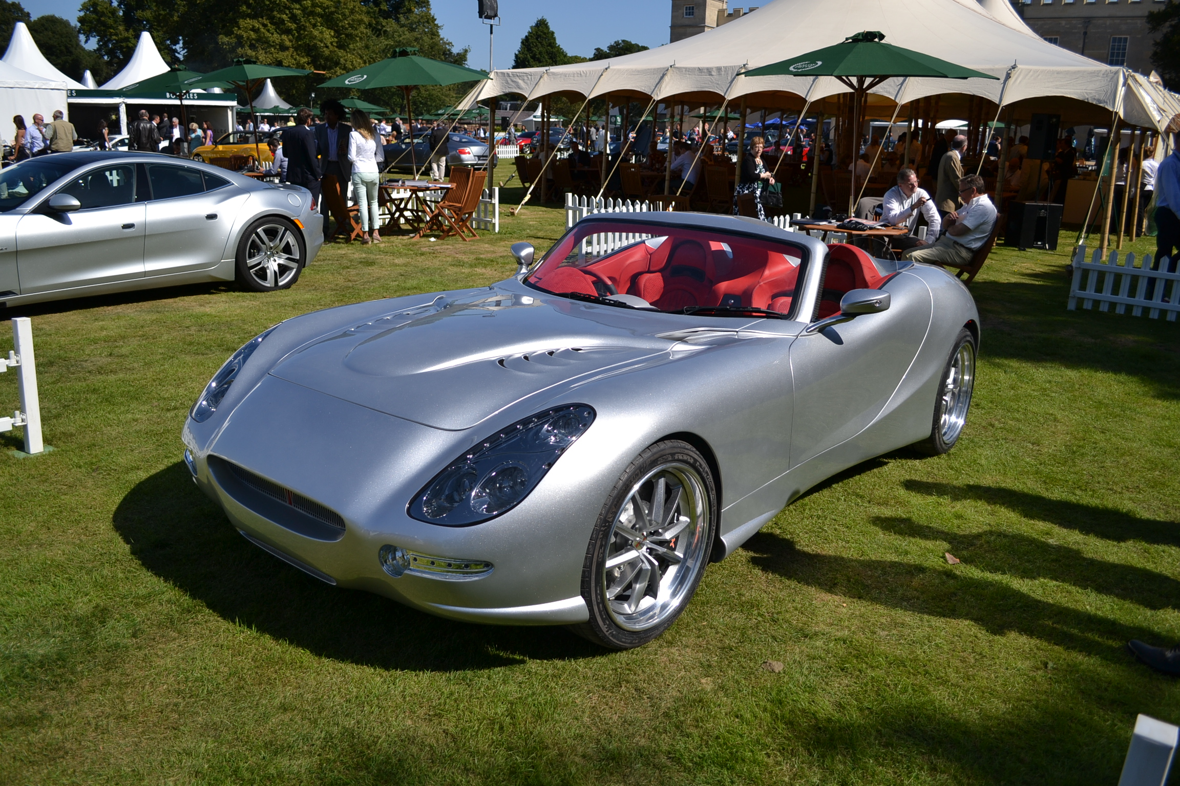 Salon Privé London 2012